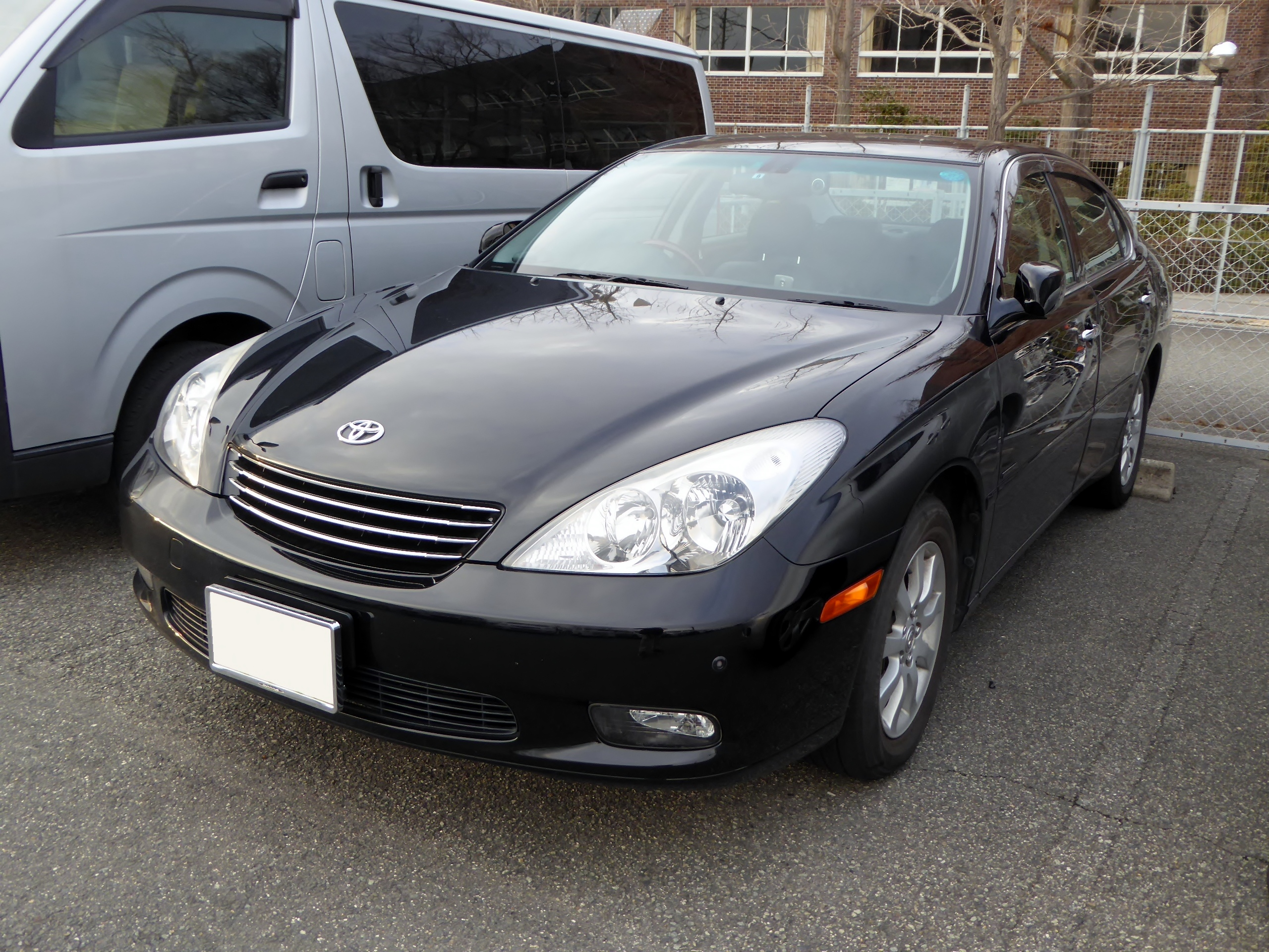 MCV30型トヨタ・ウィンダム3.0Gをフロントから撮影。